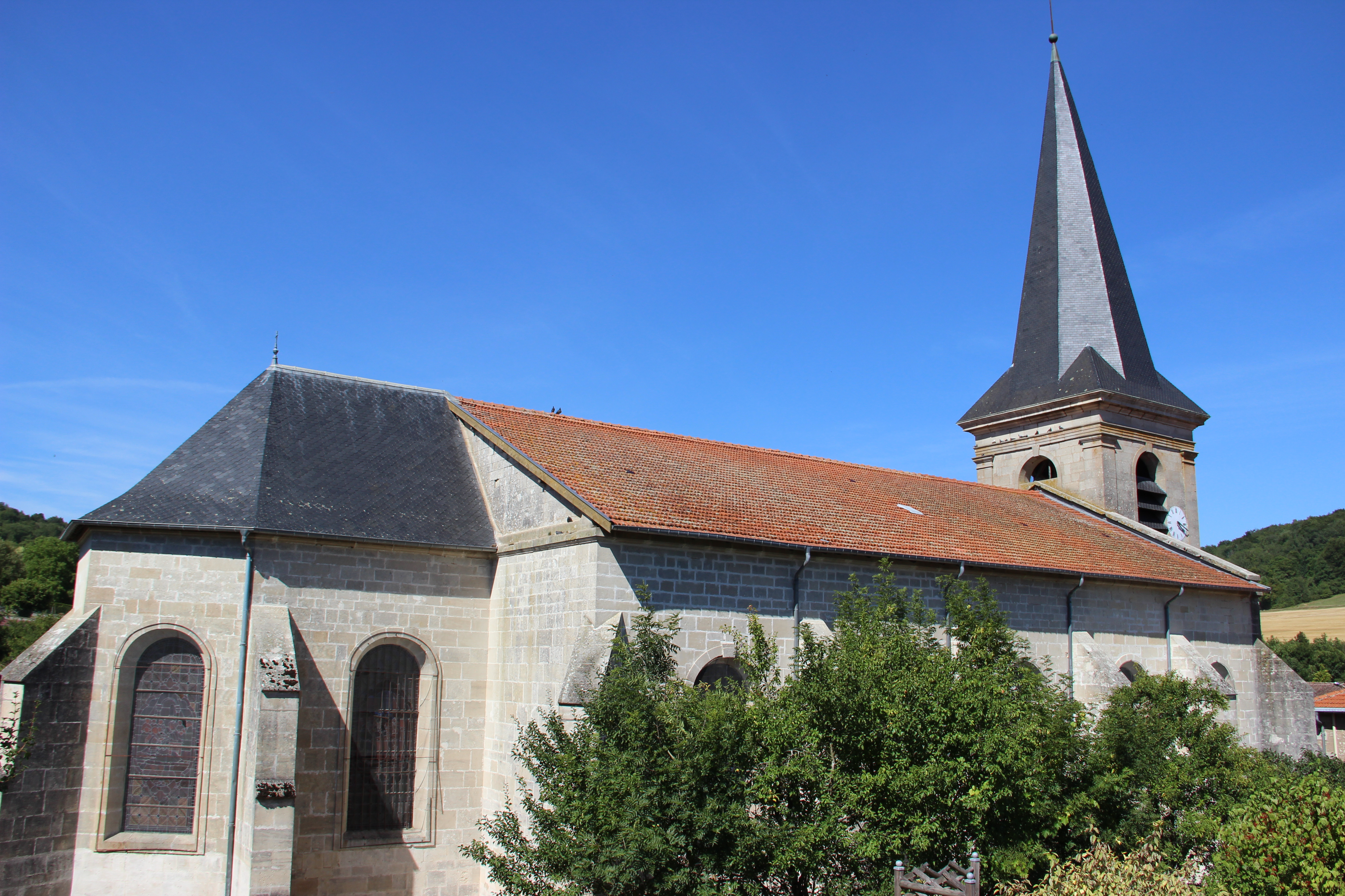 Eglise Saint-Martin de Salmagne